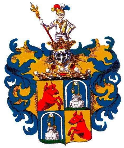 Wappen der Barone Butz von Rolsberg 1734 (ungarisches Incolat und Indigenat), s/w, dann handkoloriert